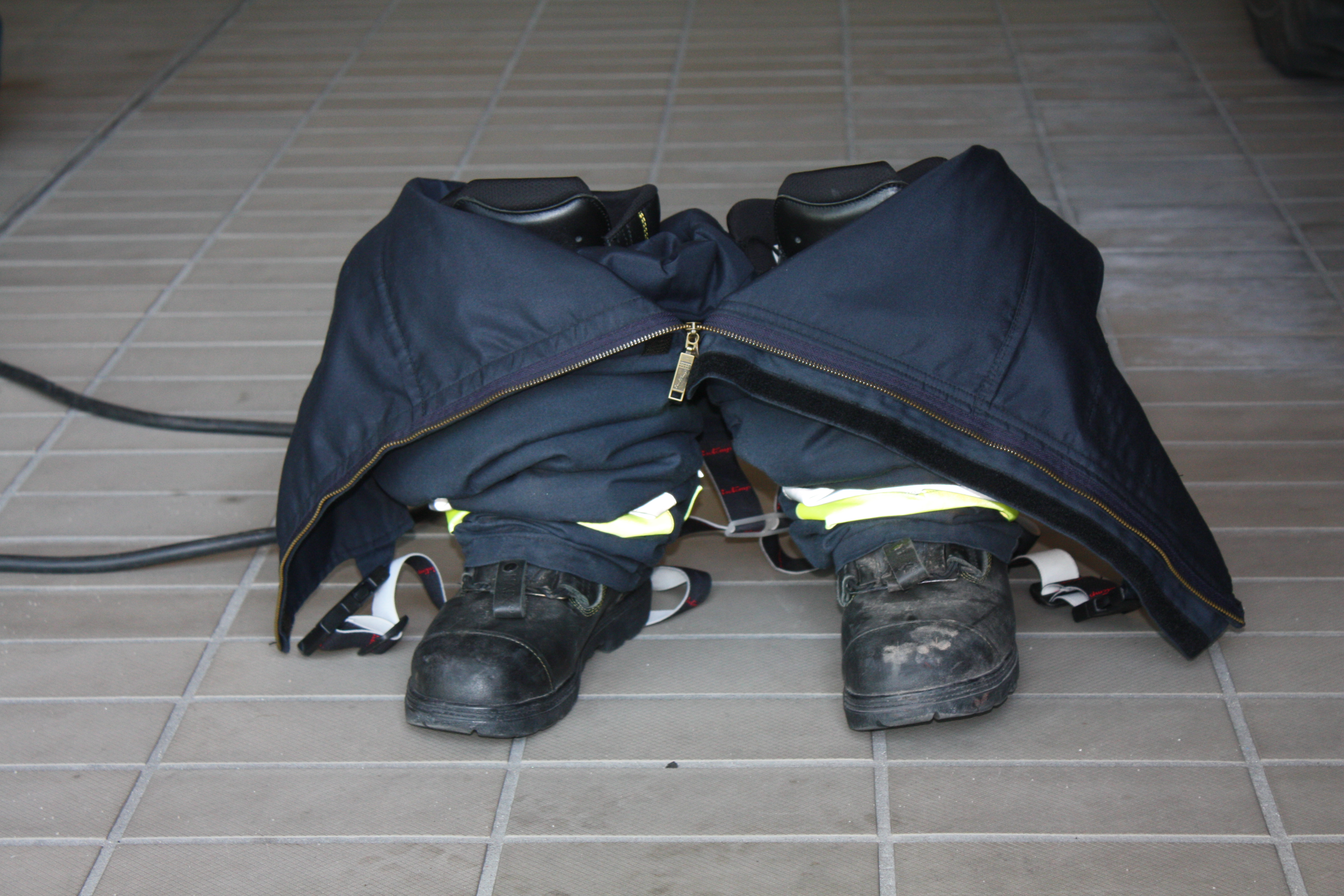 Feuerwehr Flughafen München. Die Kleidung steht bereit zum reinschlüpfen direkt neben den Einsatzwagen.